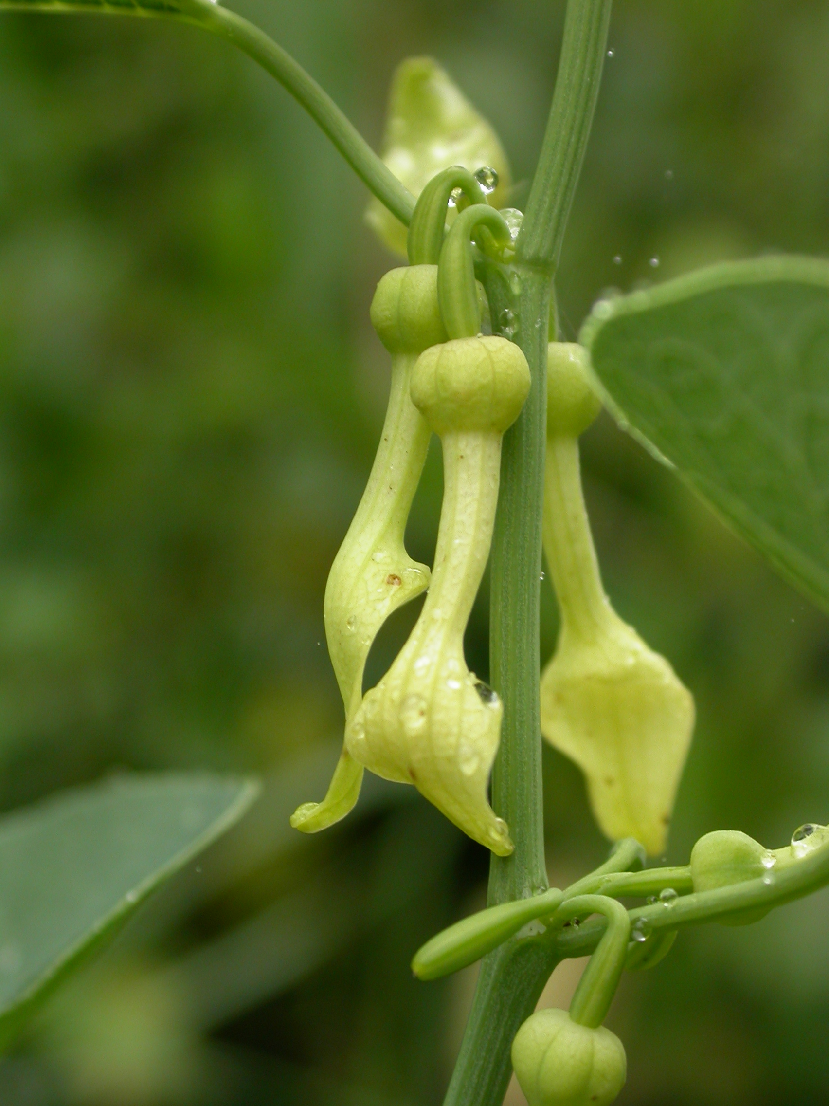 Aristolochia clematitis Creutzwald (Moselle), France